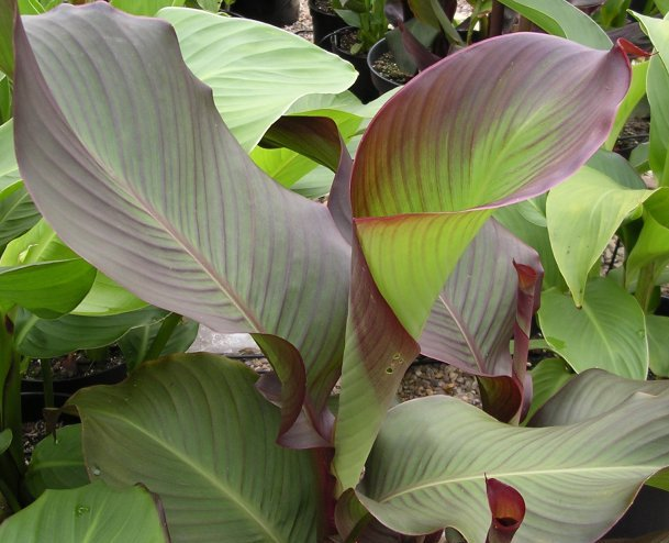 Canna indica 'Edulis'